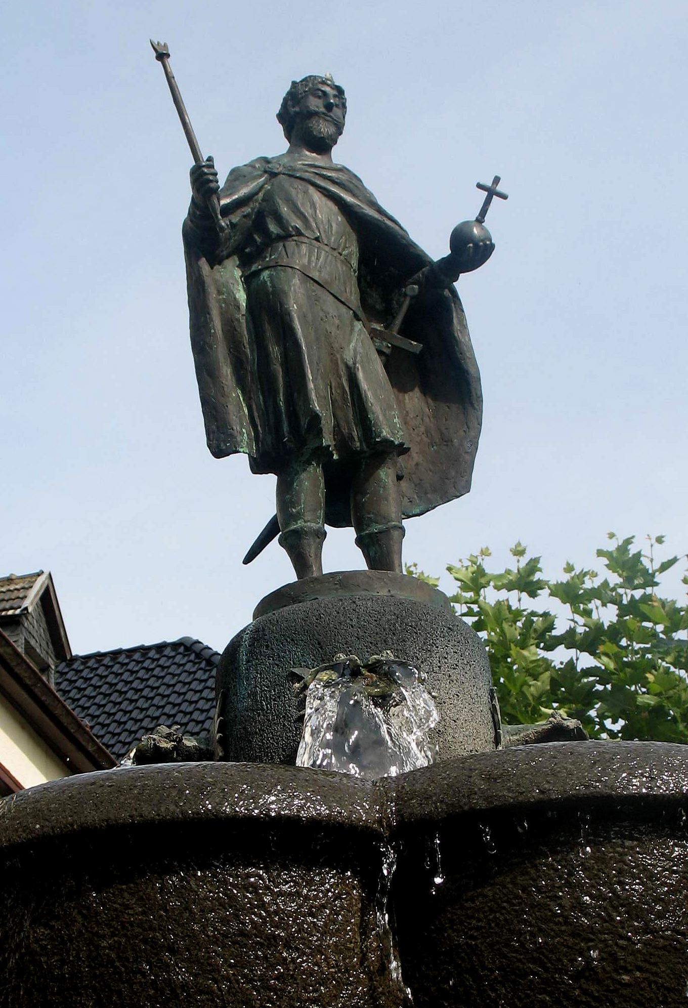 Zwentiboldbrunnen in Bad Münstereifel (geschaffen vonTheo Heiermann, 1982)